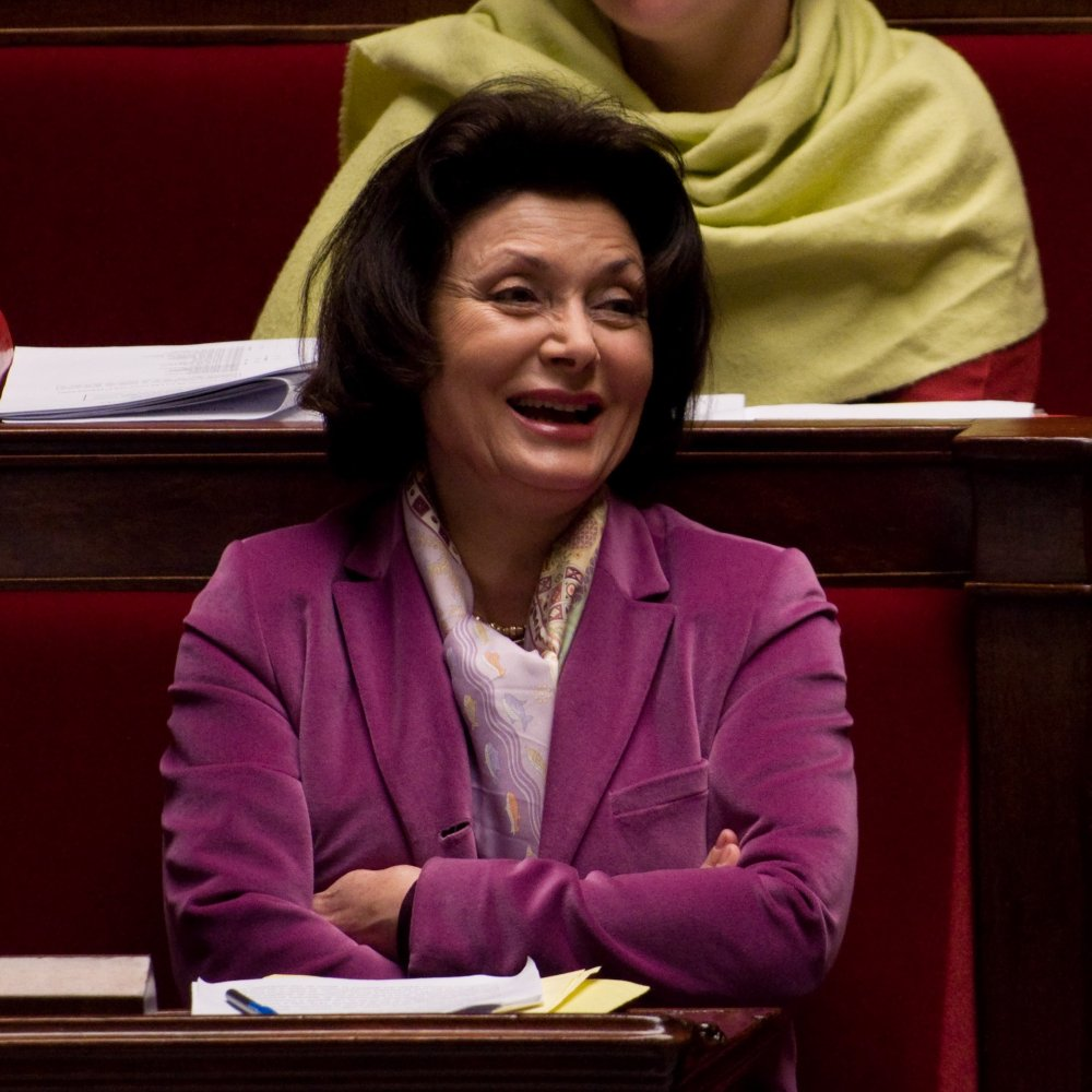 Muriel Marland-Militello, députée française, lors des débats sur la Loi Création et Internet. CC Richard Ying pour LePost.fr